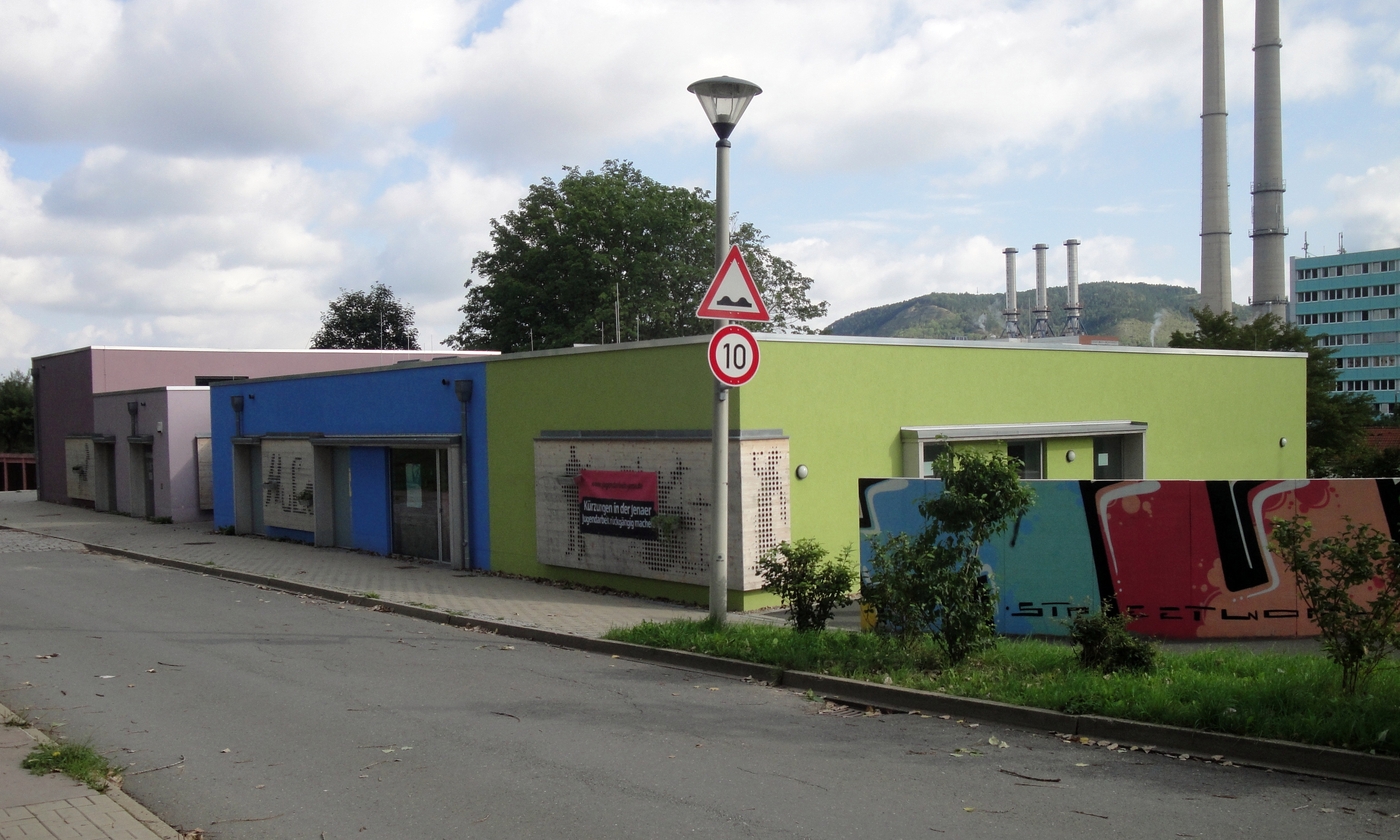 Jugendzentrum Hugo, Jena